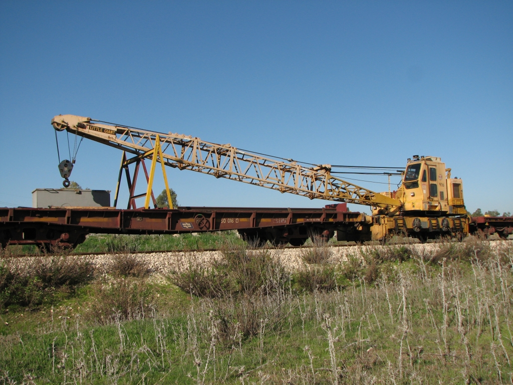 מנוף מסילתי מס' 916 מתוצרת Little Giant של רכבת ישראל